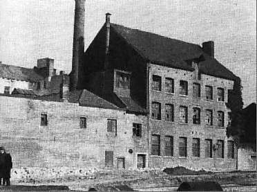 Het gebouw van de Maastrichtsche Spijker- en Draadnagelfabriek v/h Thomas Regout van 1843-1905 in de verdwenen Drieëmmerstraat in Maastricht. Het gebouw werd eind jaren 1950 gesloopt voor de bouw van de stadskantoren.